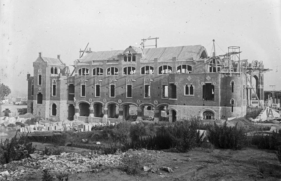 Imatge